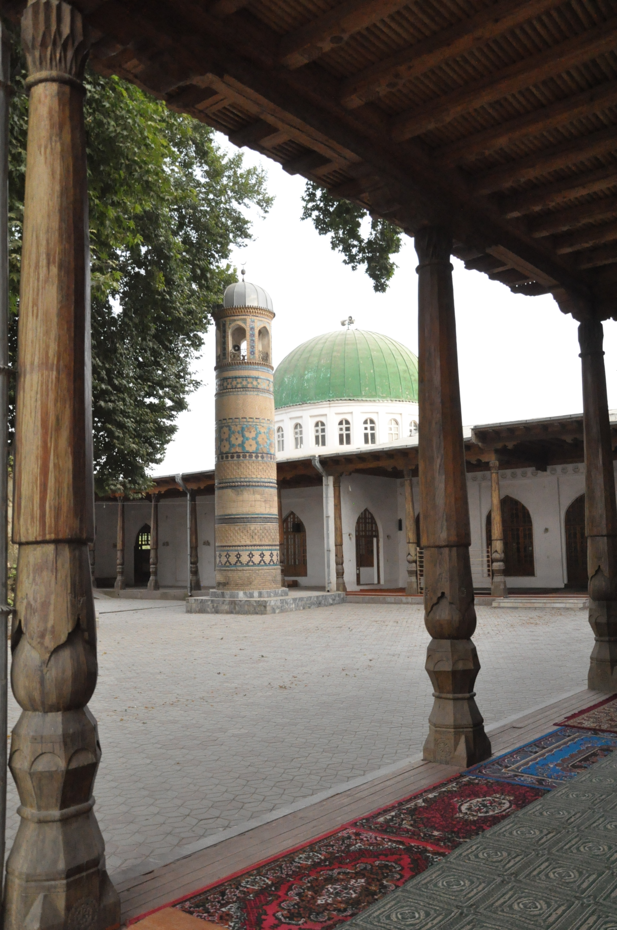 Тоҷикӣ: Масҷиди ҷомеи марказии н. Рӯдакӣ ба номи Мавлоно Яъқуби Чархӣ (2)